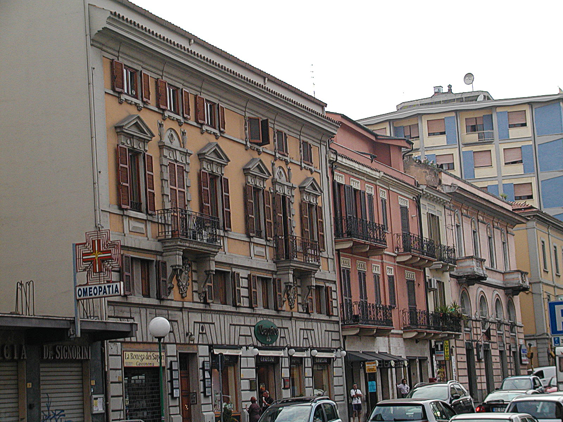 Pescara Centro Storico